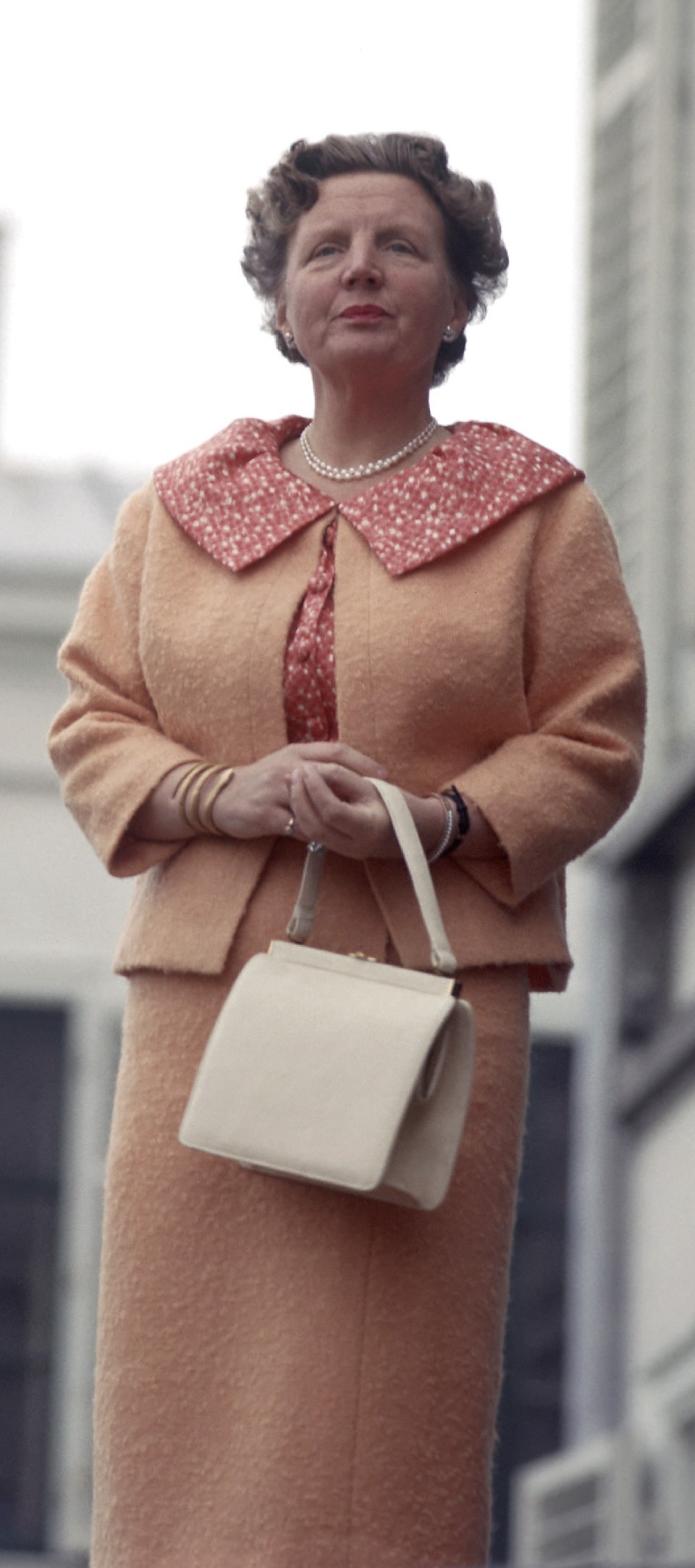 Spaarnestad Photo, SFA005002189 Portret van Koningin Juliana tijdens het defilé op Koninginnedag, paleis Soestdijk, Nederland 1959. Collectie SPAARNESTAD PHOTO/H. Hilterman Portret of Queen Juliana during the parade on Queensday in front of Soestdijk Palace. The Netherlands, 1959. Voor meer informatie en voor meer foto’s uit de collectie van Spaarnestad Photo, bezoek onze Beeldbank: U kunt ons helpen onze kennis van de fotocollecties te verrijken door tags en commentaren toe te voegen. Herkent u mensen of locaties of heeft u een bijzonder verhaal te vertellen bij één van de foto’s, laat dan een reactie achter (als u ingelogd bent bij Flickr) of stuur een mailtje naar: You can help us gain more knowledge on the content of our collection by simply adding a comment with information. If you do not wish to log in, you can write an e-mail to: .